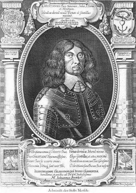 Gravure représentant Christian de Saxe-Merseburg Source Deutsche Fotothek Auteur : Margaret[a] Rastrumin (Maler); Johann Dürr (Stecher, tätig um 1640 bis um 1680) Date : entre 1640 et 1680 Original consultable à Dresde, Staatliche Kunstsammlungen Dresden, Kupferstichkabinett Dresden